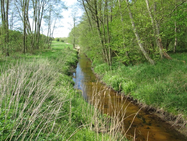 Østerbækken ved Dyrvad / Mølskov